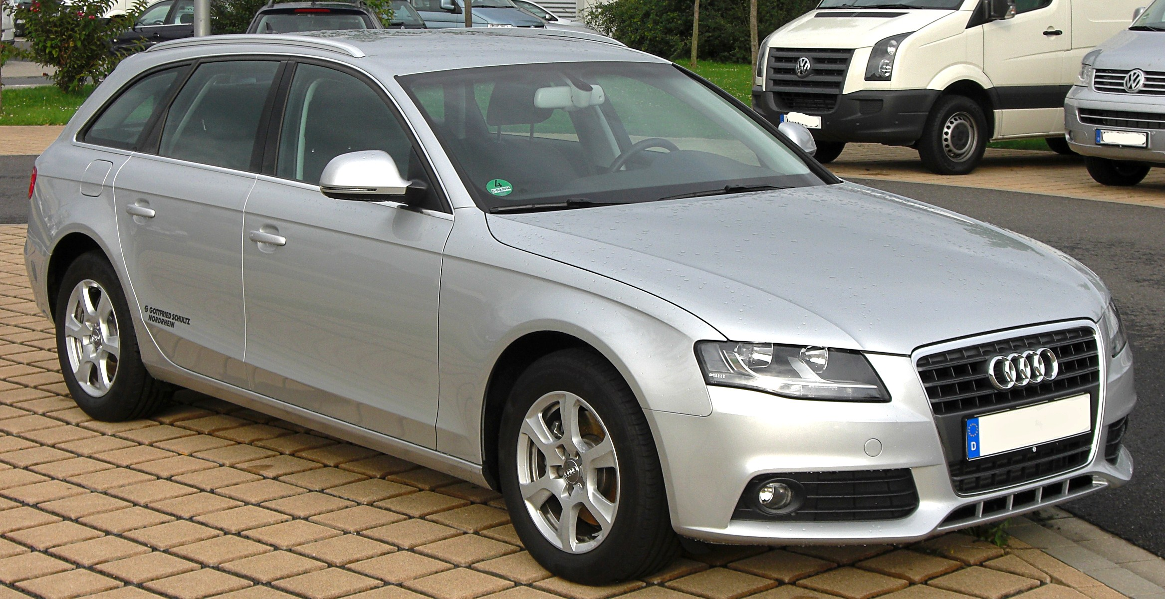 Audi A4 Avant (B8)